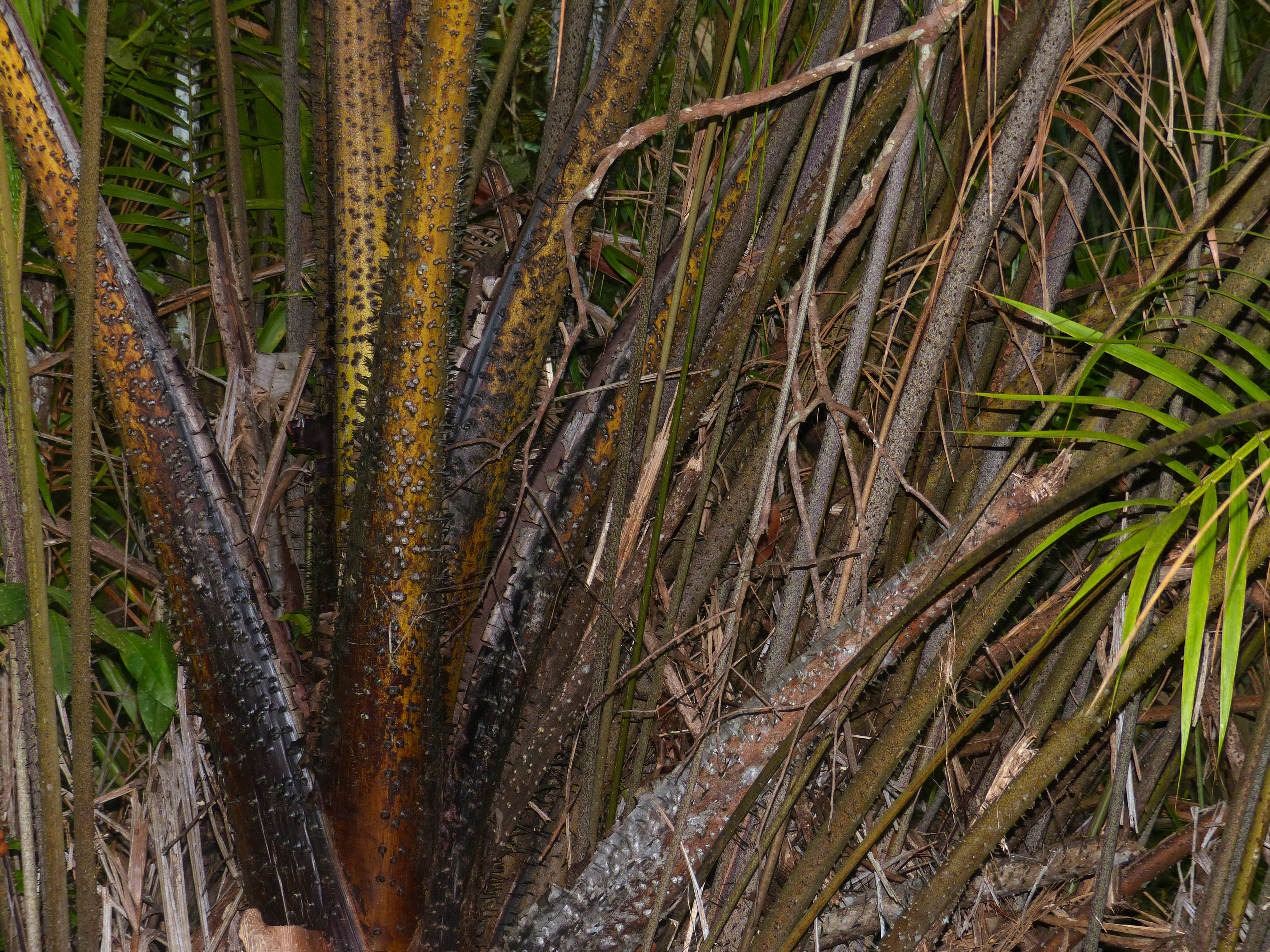 Bako NP, Sarawak, MALAYSIA